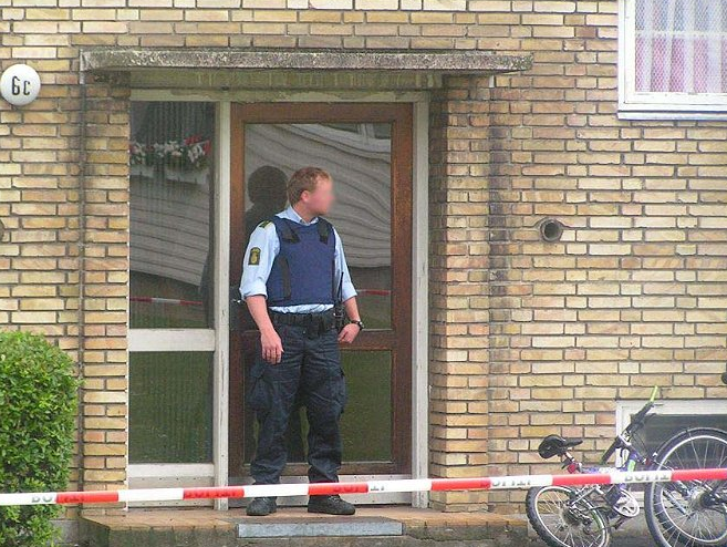 politi med alm skudsikker vest